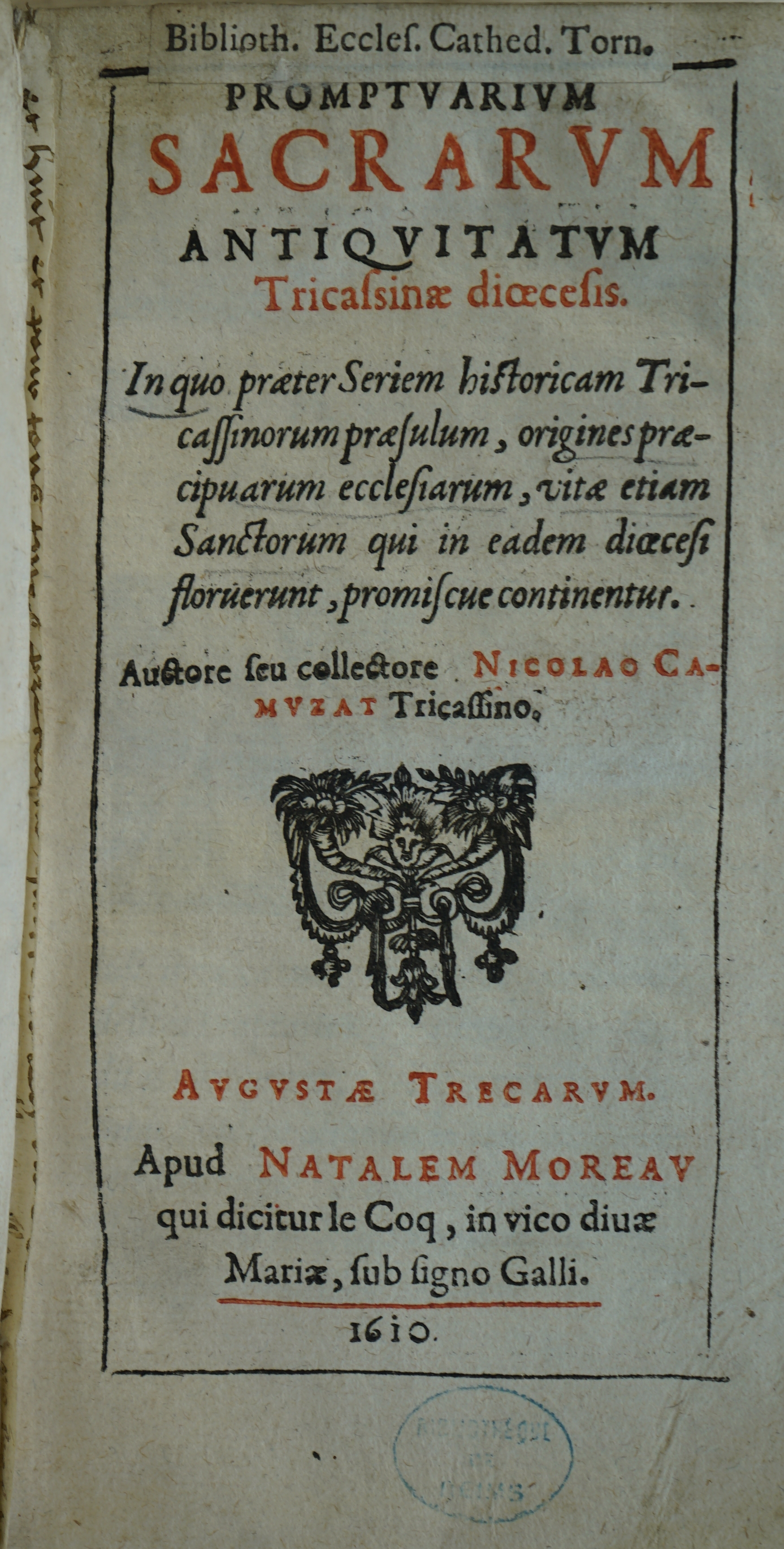 écrit par Nicolas Camusat.